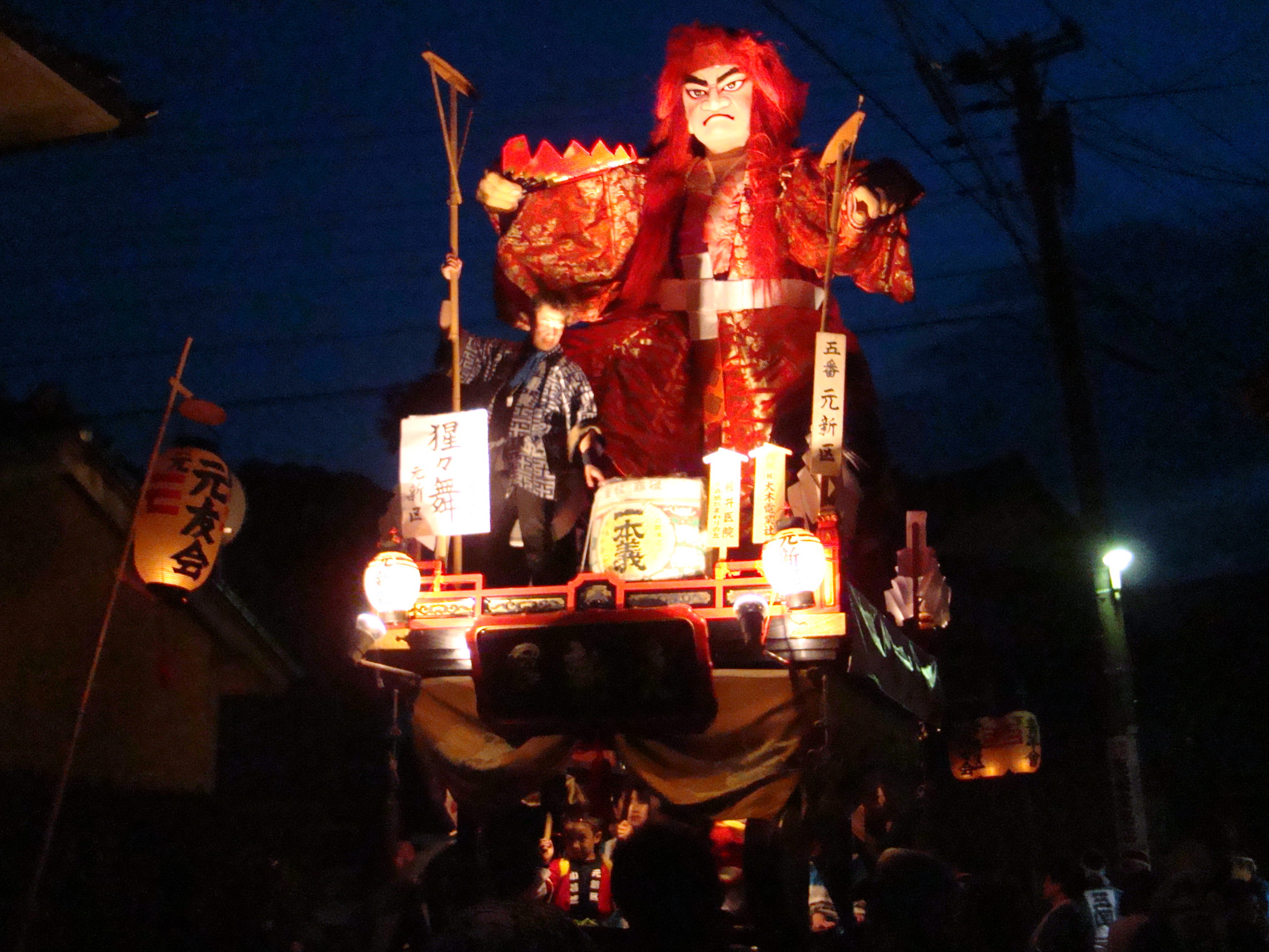 三国祭りの山車（猩々舞）2011